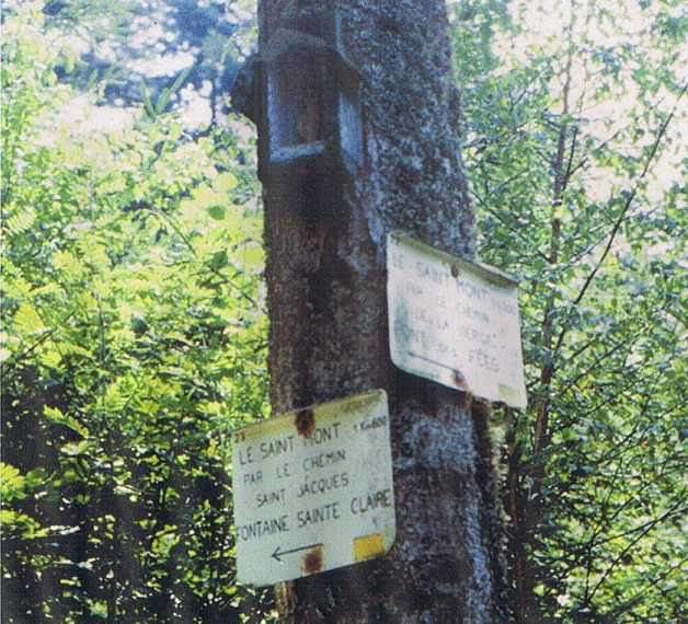 Exemple de signalisation du Club Vosgien vers les sites de Sainte Claire, le Saint Mont, Pont des fées,... Celle-ci se trouve à proximité du petit pont traversant la cascade de Miraumont, en contrebas du restaurant Le Saint Romary.. Ce petit pont a été construit en béton armé, en 1969, par le groupe d'éclaireurs de France de Saint Etienne-lès-Remiremont, pour rétablir le circuit de randonnées du "Club Vosgien". Pour toute information concernant la "Fédération du Club Vosgien" : voir le site Internet